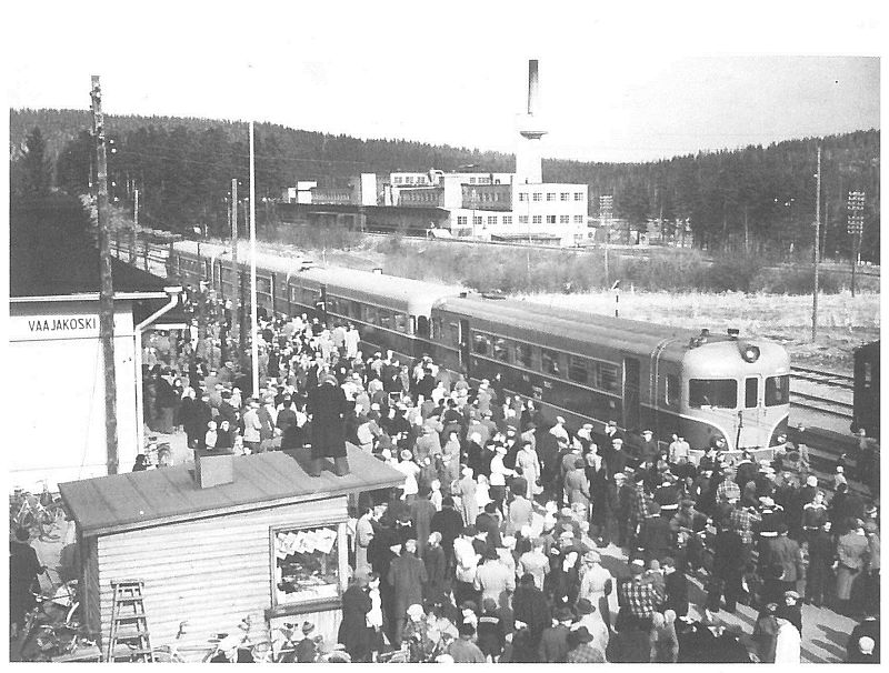 Vaajakosken rautatieasema vuonna 1954